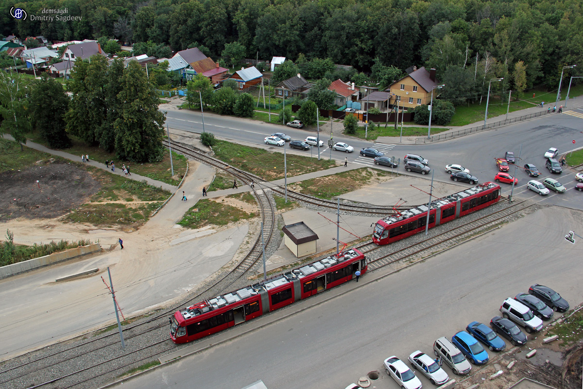 Трамваи АКСМ-843 на треугольнике, Казань